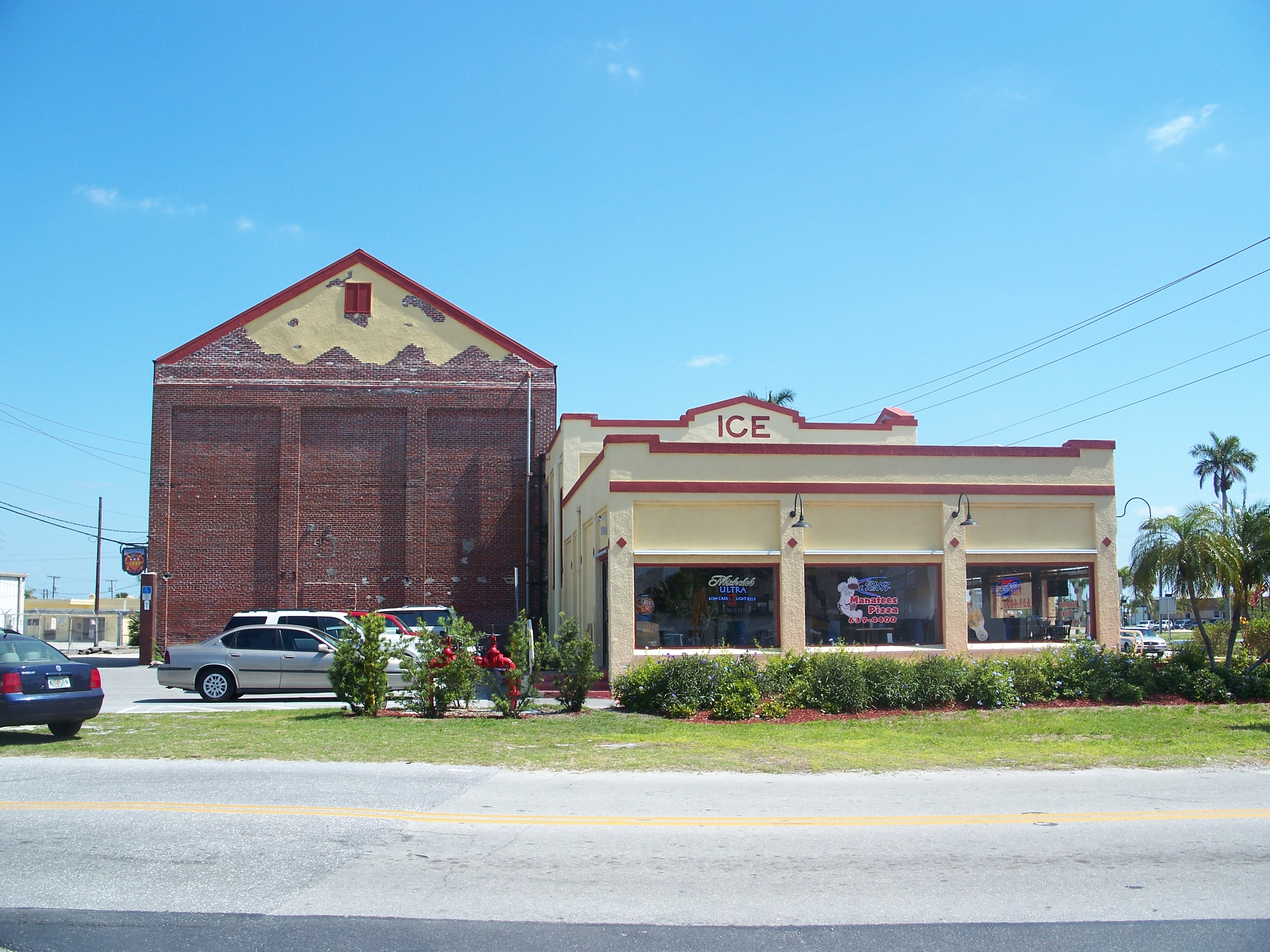 Punta Gorda, Florida: Punta Gorda Ice Plant